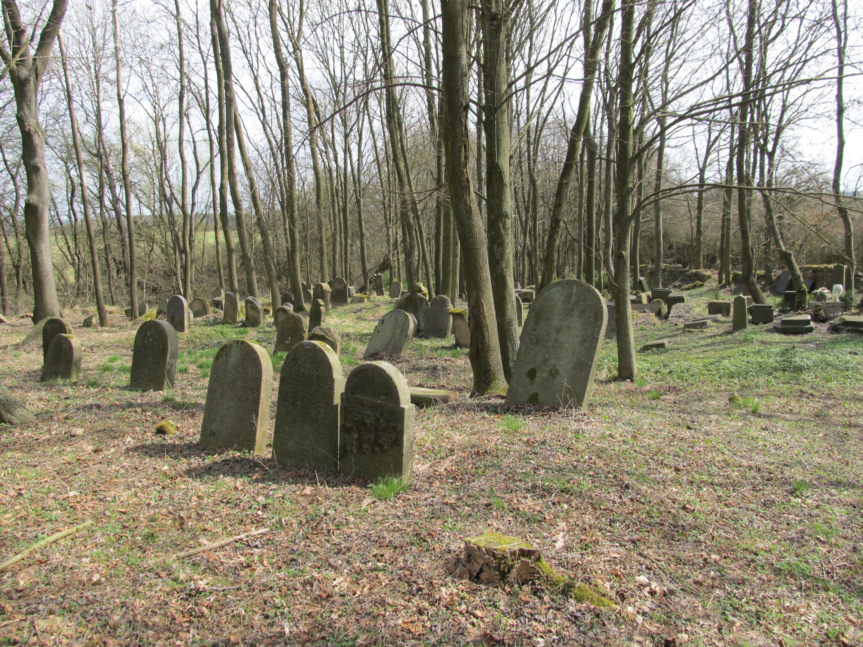 Všeruby ŽH 04